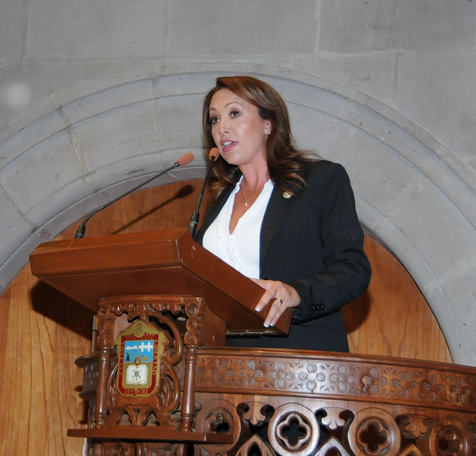 Cristina Ruiz Sandoval